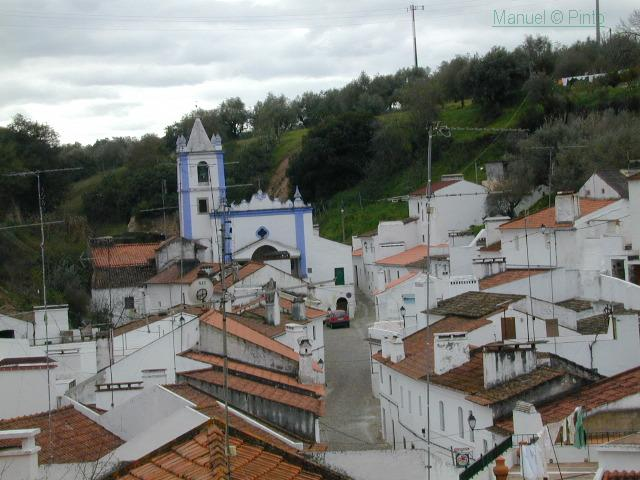 Vista geral da Igreja de Brotas